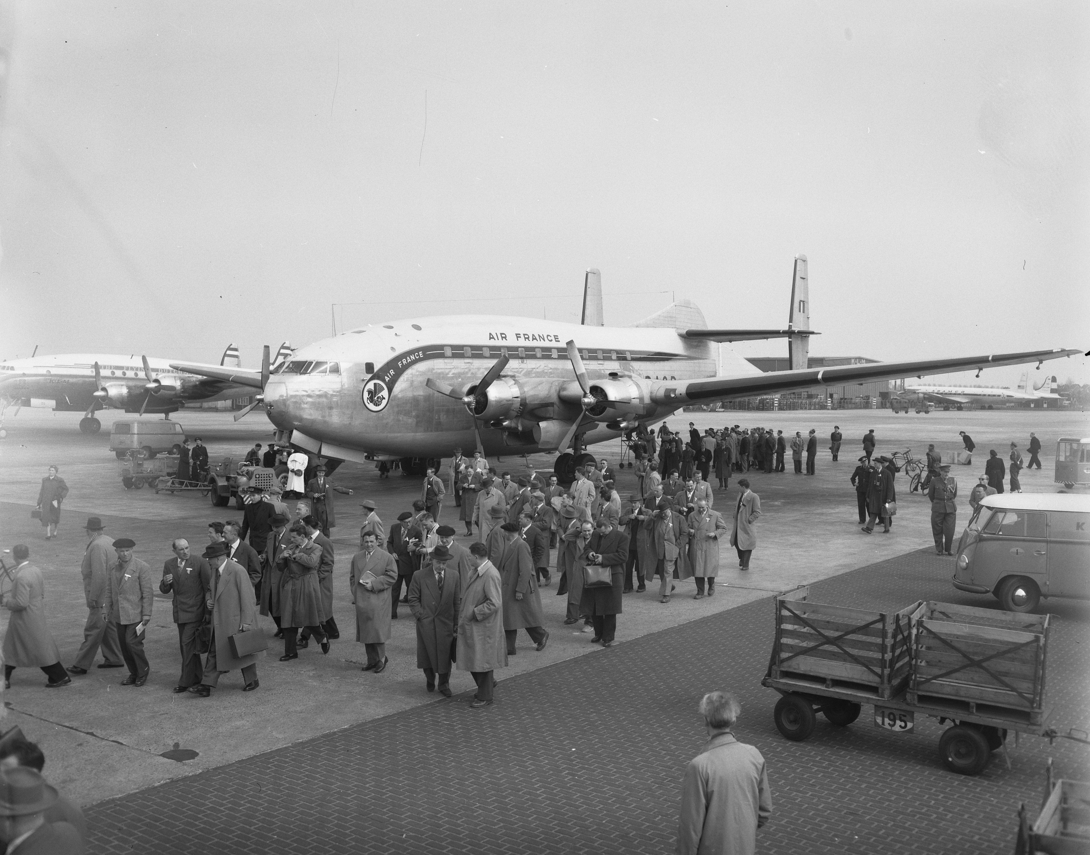 Collectie / Archief : Fotocollectie Anefo Reportage / Serie : [ onbekend ] Beschrijving : Aankomst Franse schilders met dubbeldek vliegtuig Schiphol Datum : 27 april 1956 Trefwoorden : AANKOMST, SCHILDERS, VLIEGTUIGEN Fotograaf : Noske, J.D. / Anefo Auteursrechthebbende : Nationaal Archief Materiaalsoort : Negatief (zwart/wit) Nummer archiefinventaris : bekijk toegang 2.24.01.04 Bestanddeelnummer : 907-7198